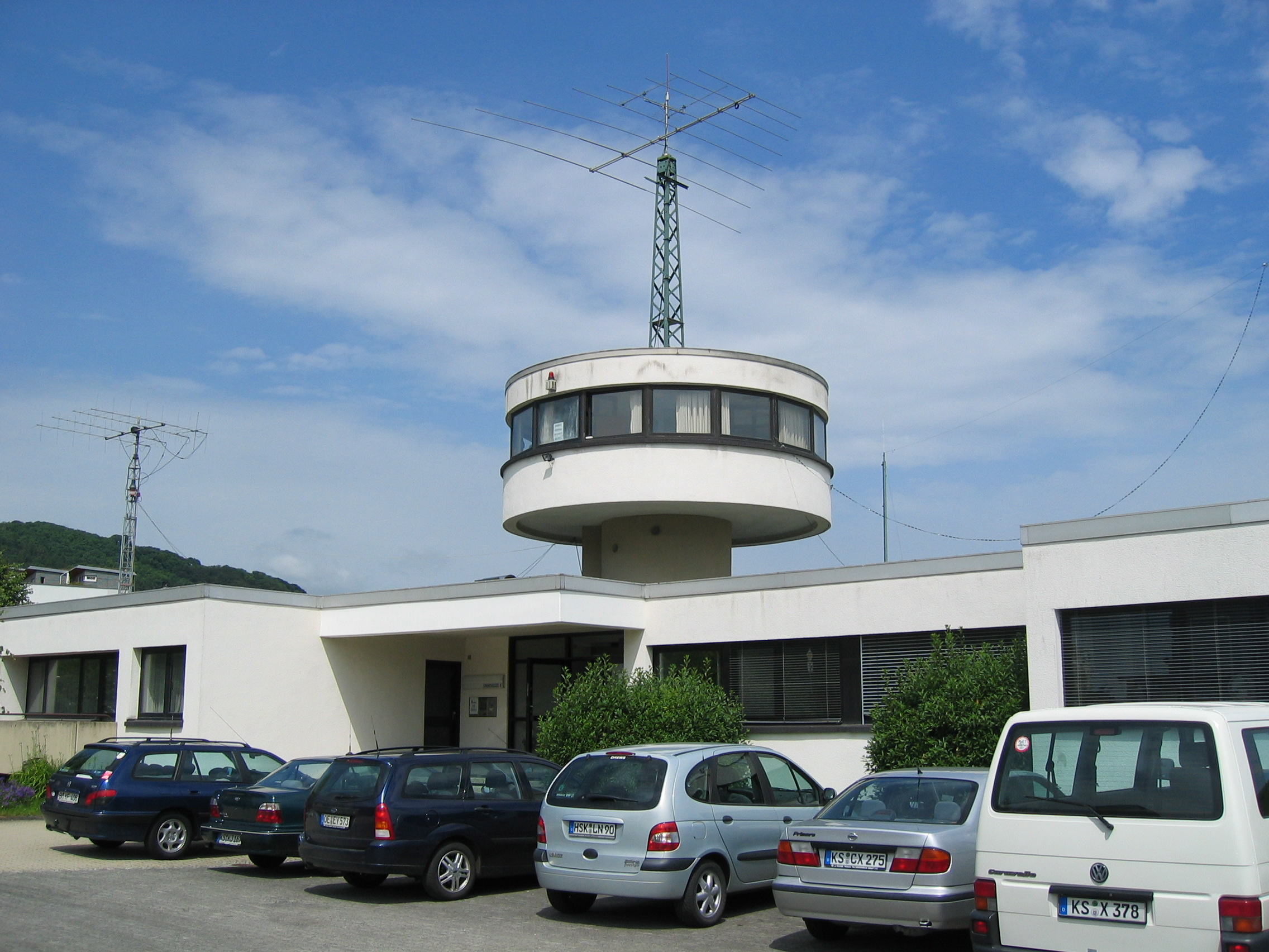 DARC HQ in Kassel-Baunatal